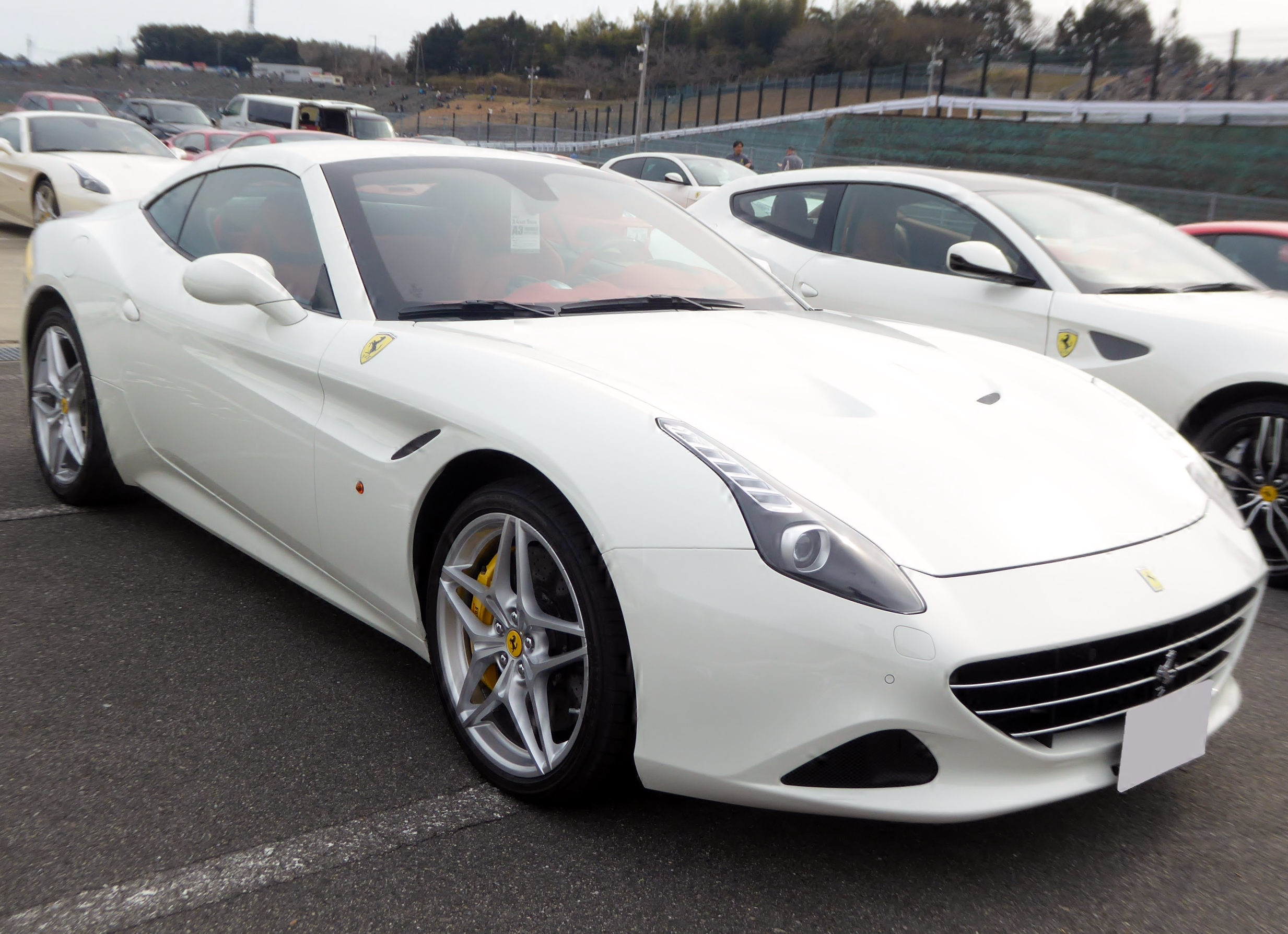 ABA-F149型フェラーリ・カリフォルニアTを撮影。